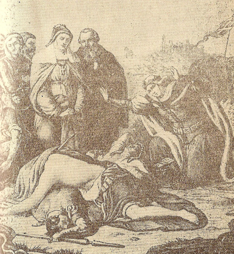 Św. Jadwiga i Anna Czeska rozpaczające nad zwłokami Henryka Pobożnego. Rys. Aleksander Lesser, 1884